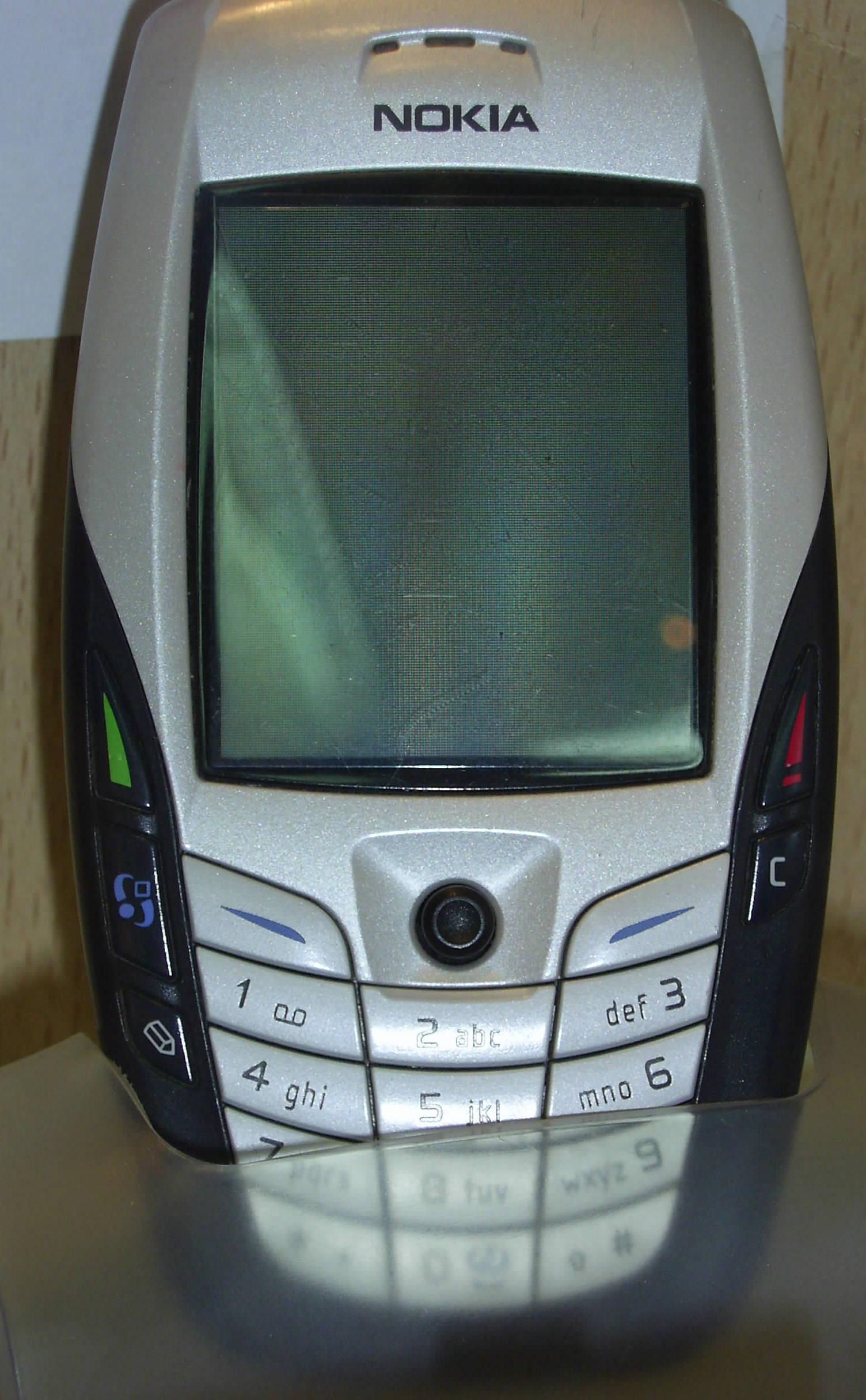 Teléfono móvil Nokia 6600